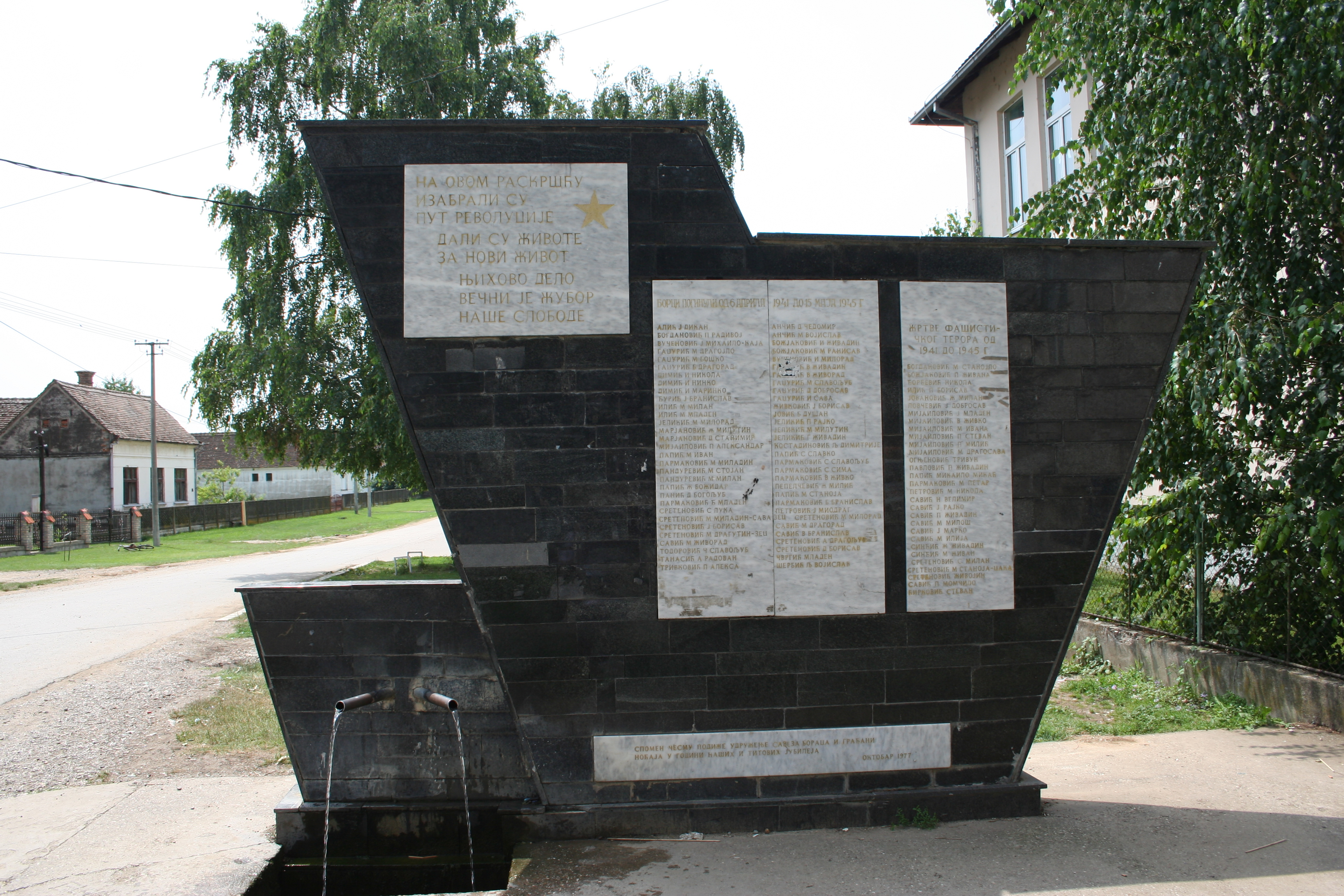 Spomen česma, Noćaj